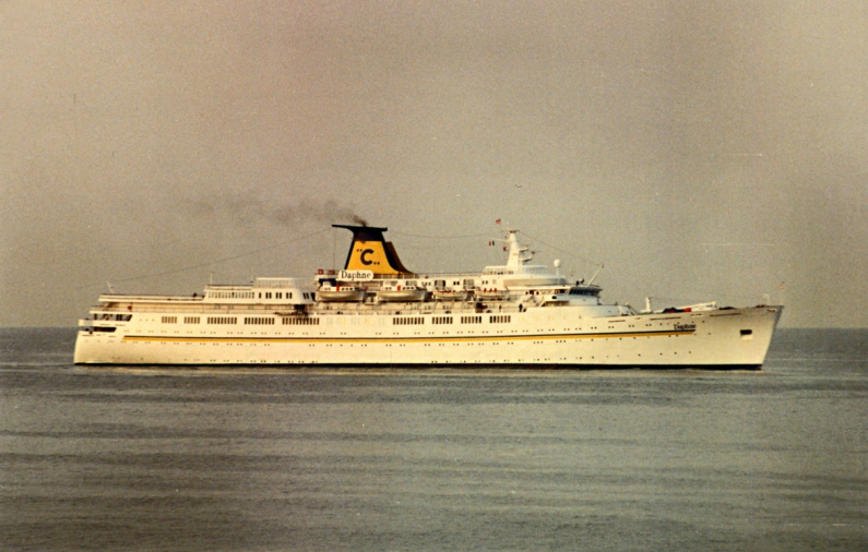 M/n Daphne